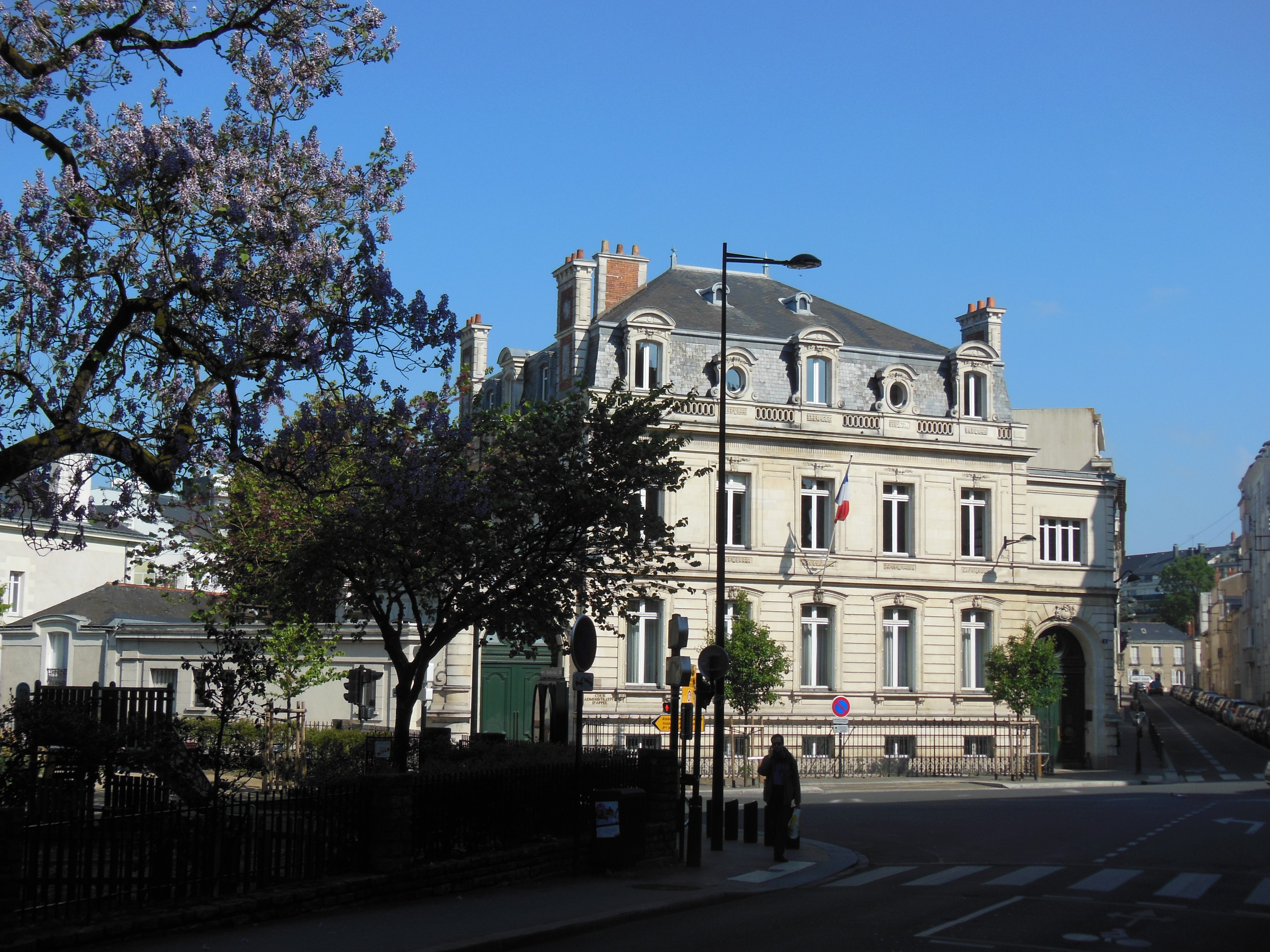 Place de l'Edit de Nantes, à Nantes, vue de la rue de la Rosière d'Artois. Le bâtiment est la cour administrative d'appel.